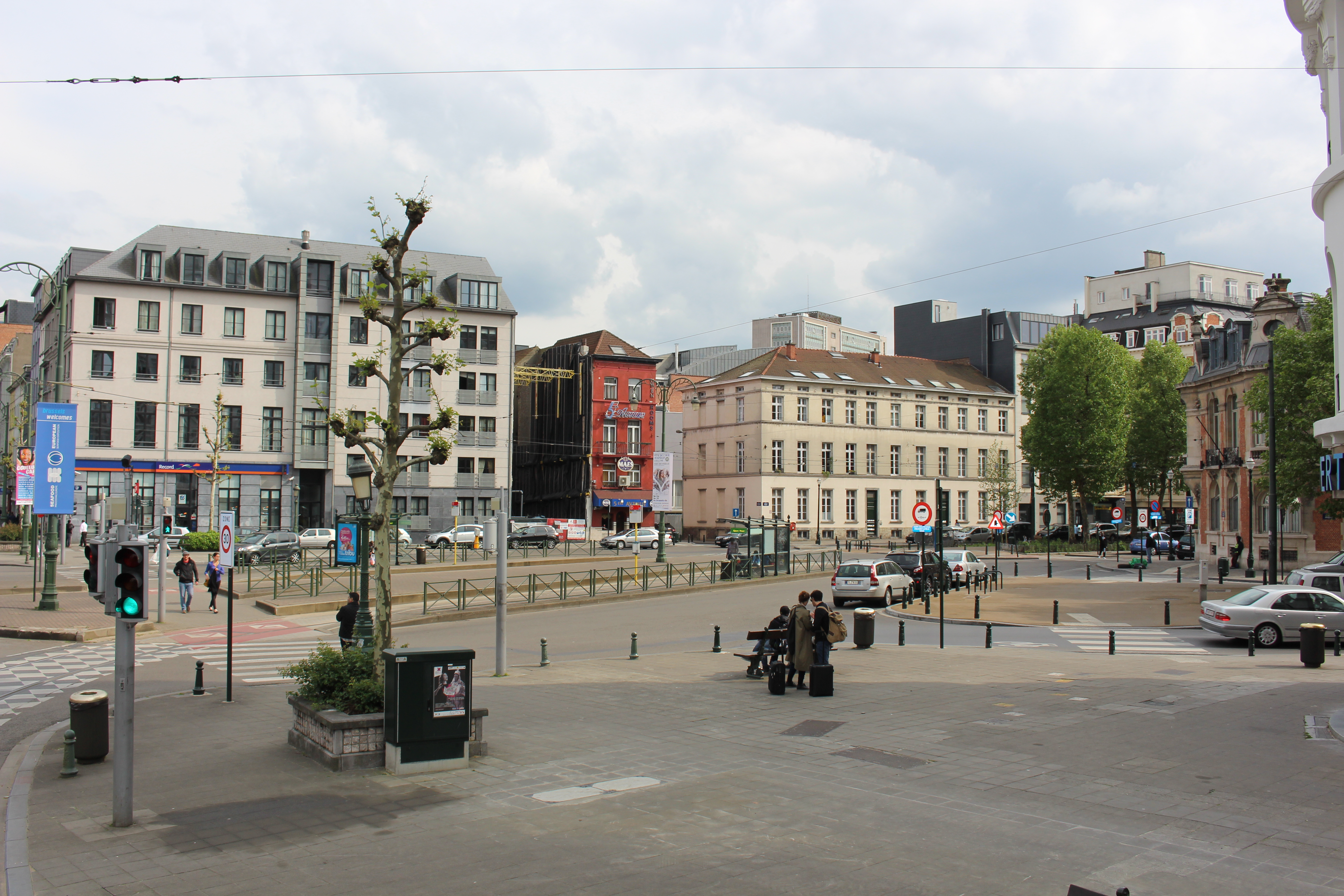 Площадь Изер (Place de l'Yser, IJzerplein)